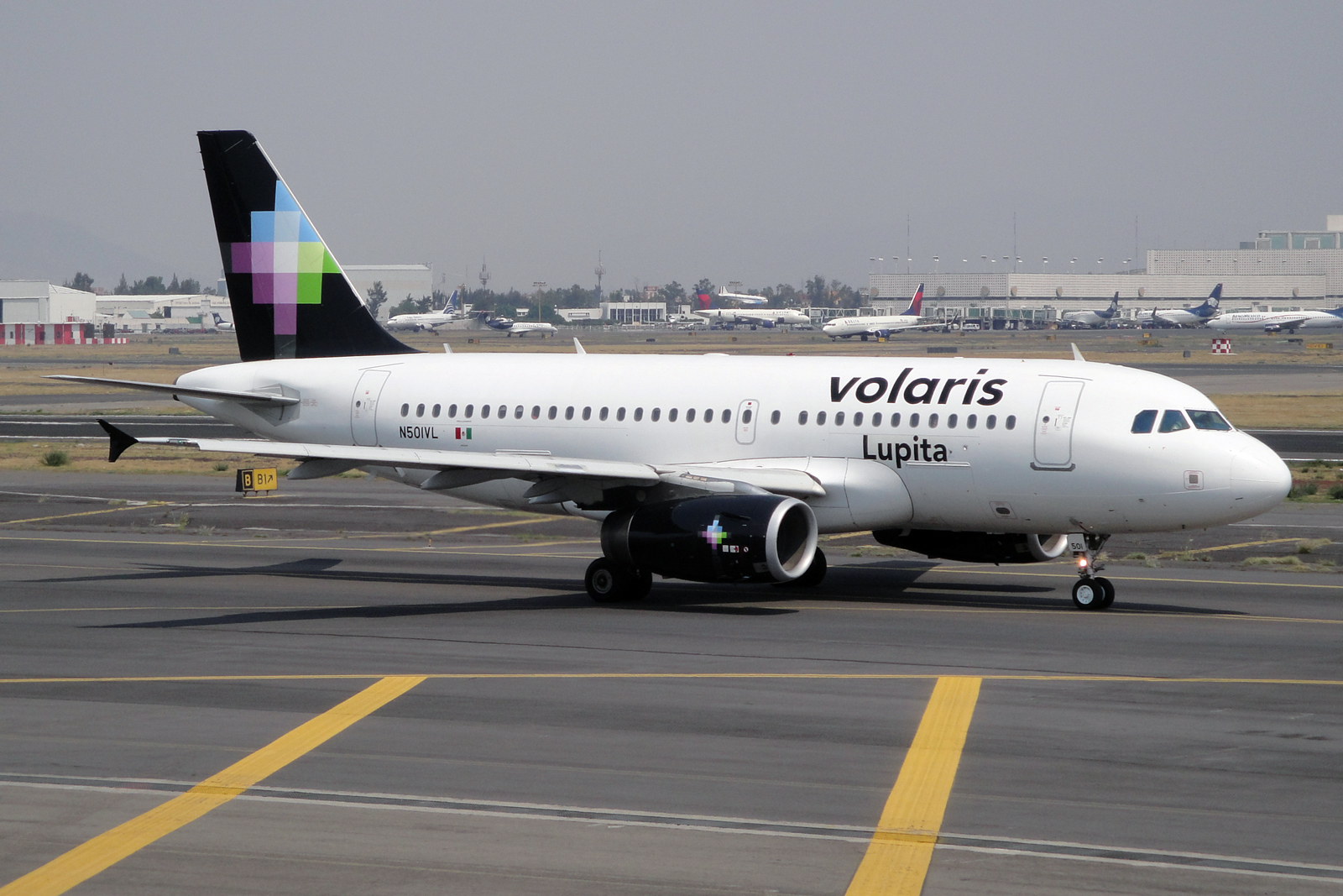 Mexico City (- Licenciado Benito Juarez International) (MEX / MMMX) Mexico , 5.2011